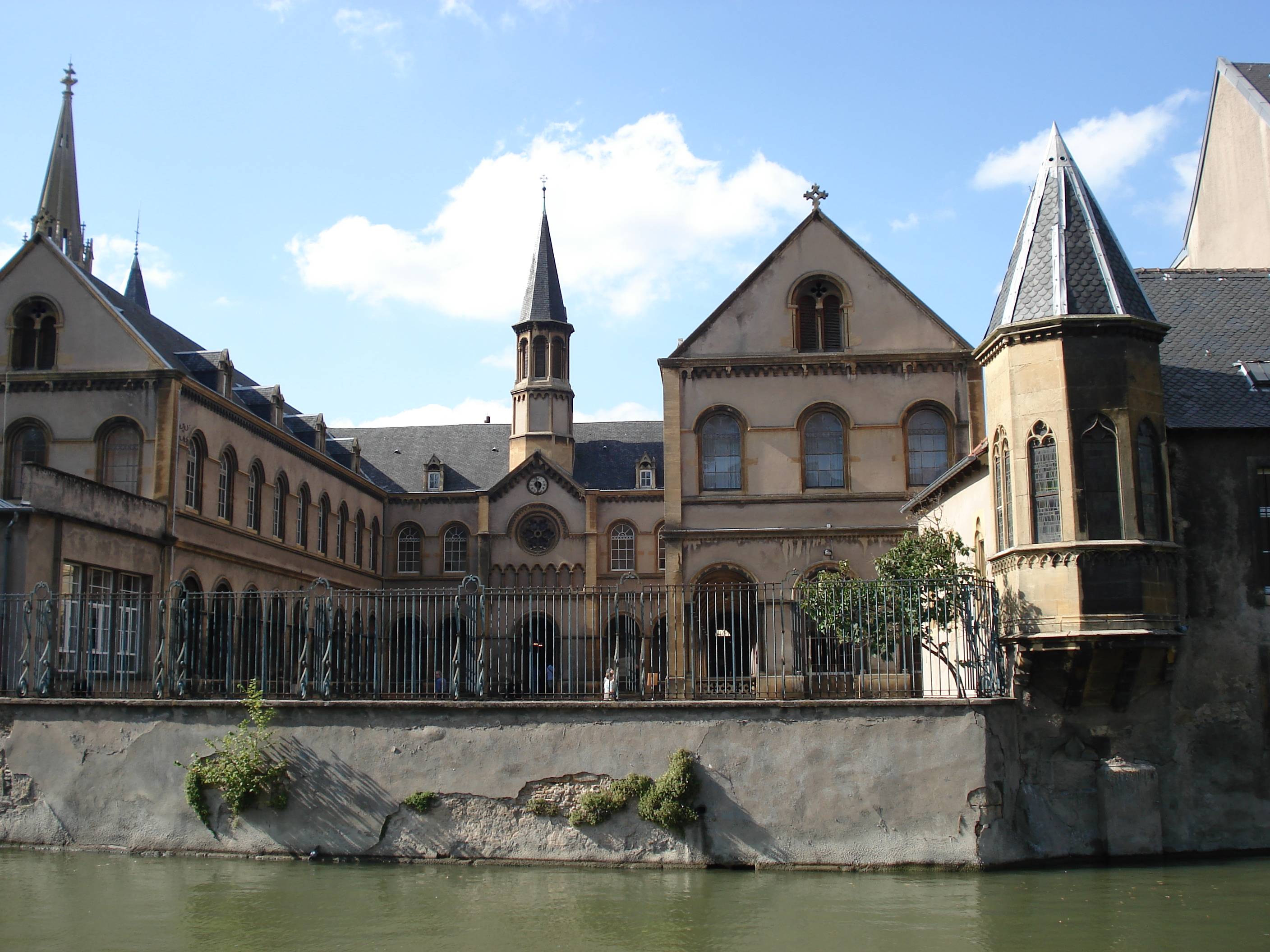 Cloître sainte Constance (lycée Fabert de Metz) vu depuis l'opéra théâtre